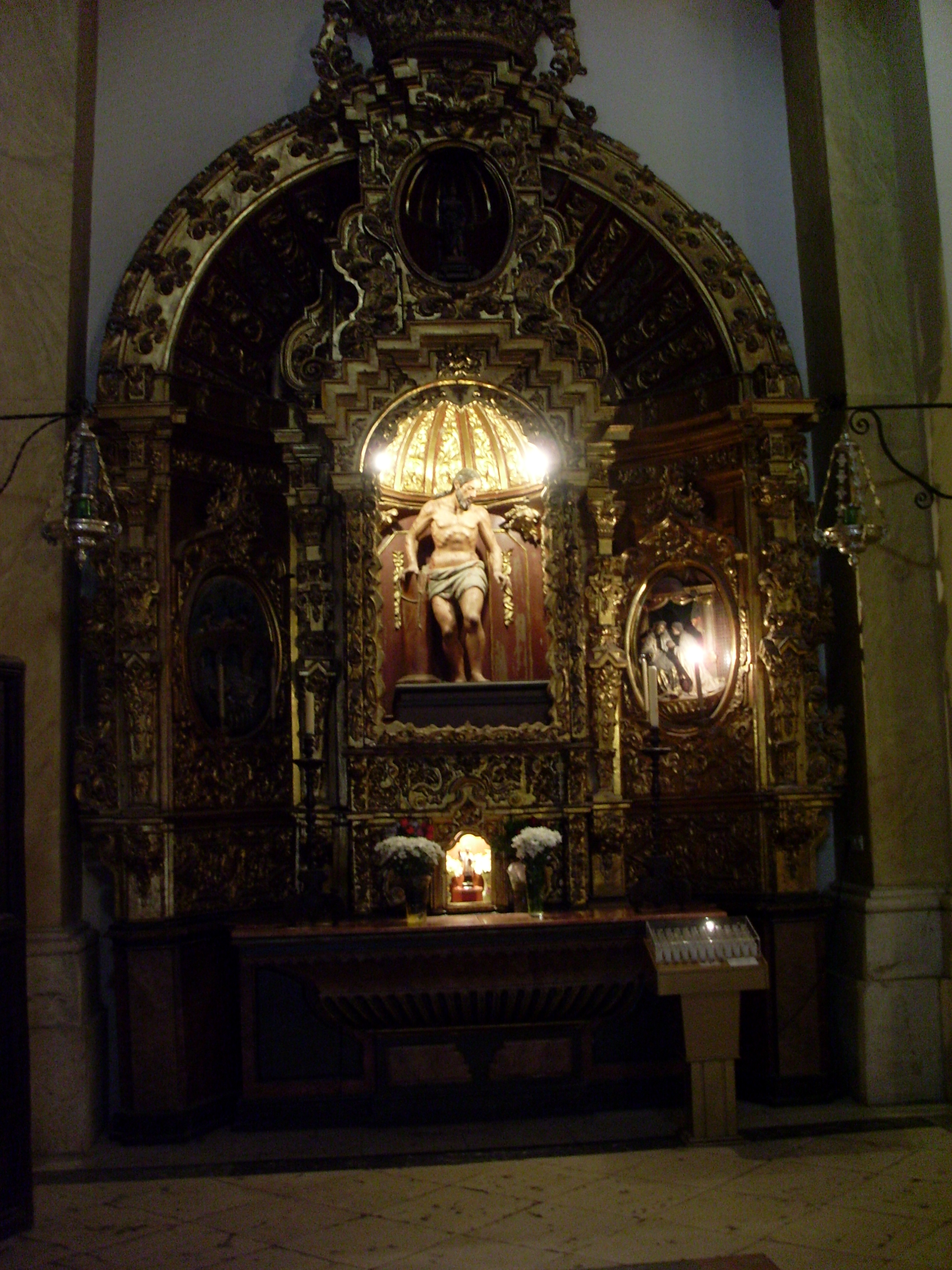 Altar del Cristo atado a la columna de la Iglesia de Sta. Maria de Écija.Este altar se encuentra al final de la nave de la Epístola de la Iglesia de Sta.a María de Écija.